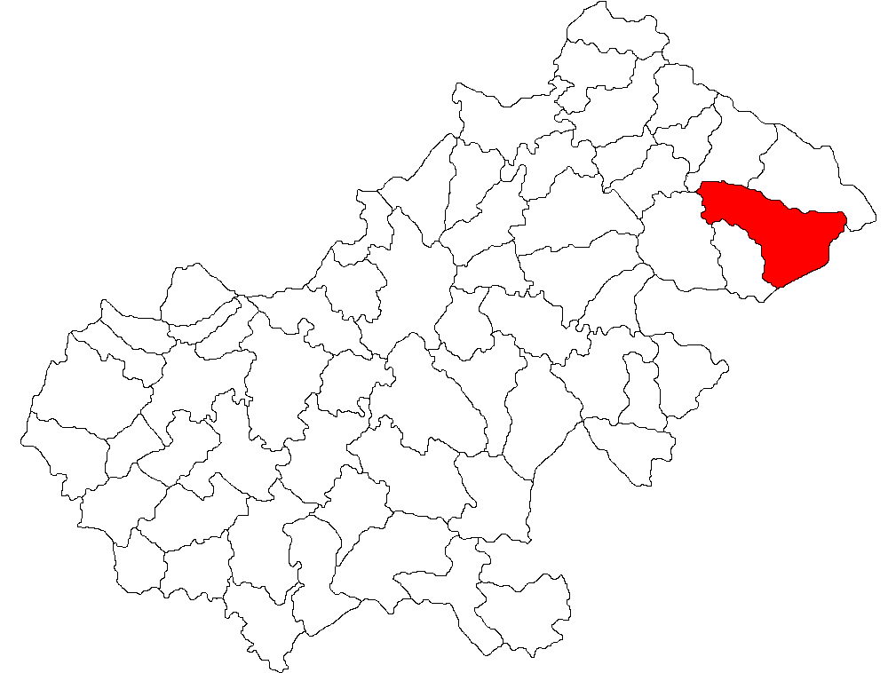 Categorie:Hărţi ale judeţului Satu Mare